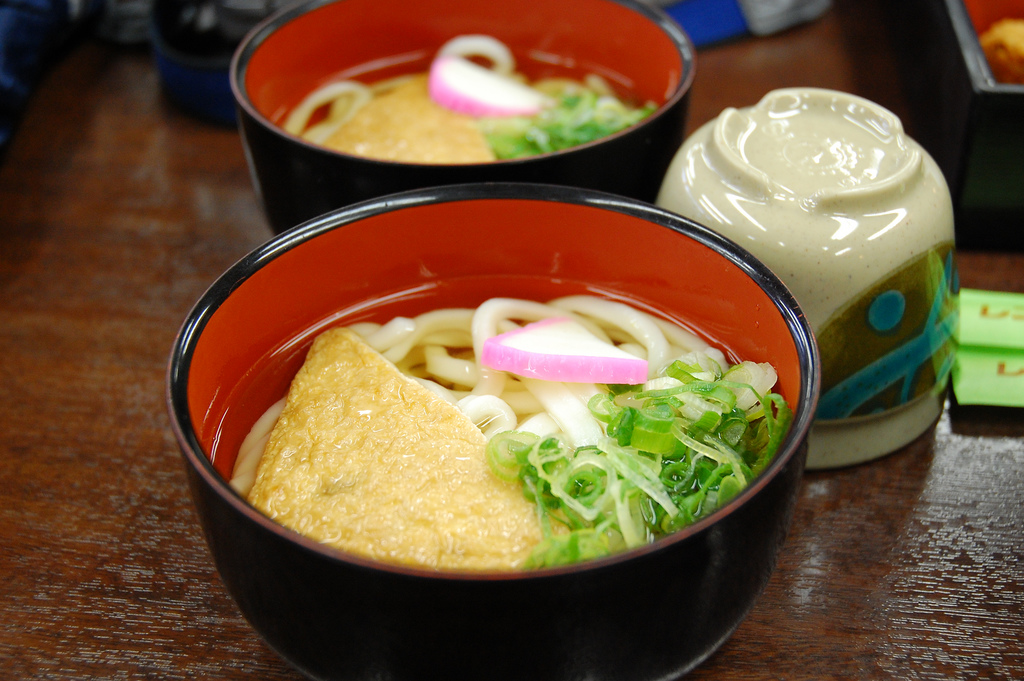 きつねうどん（京都）